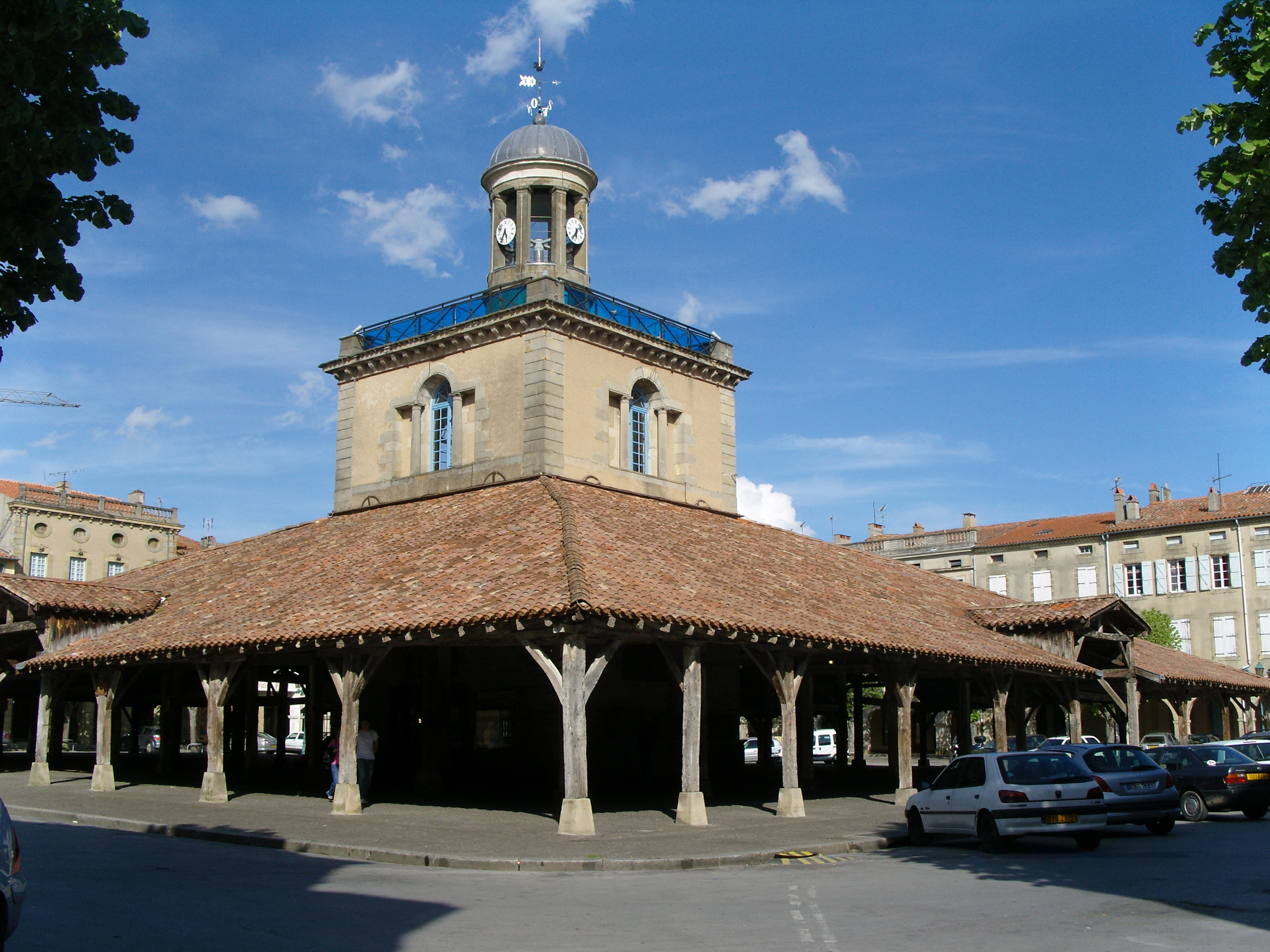 Le beffroi de Revel (31250), France